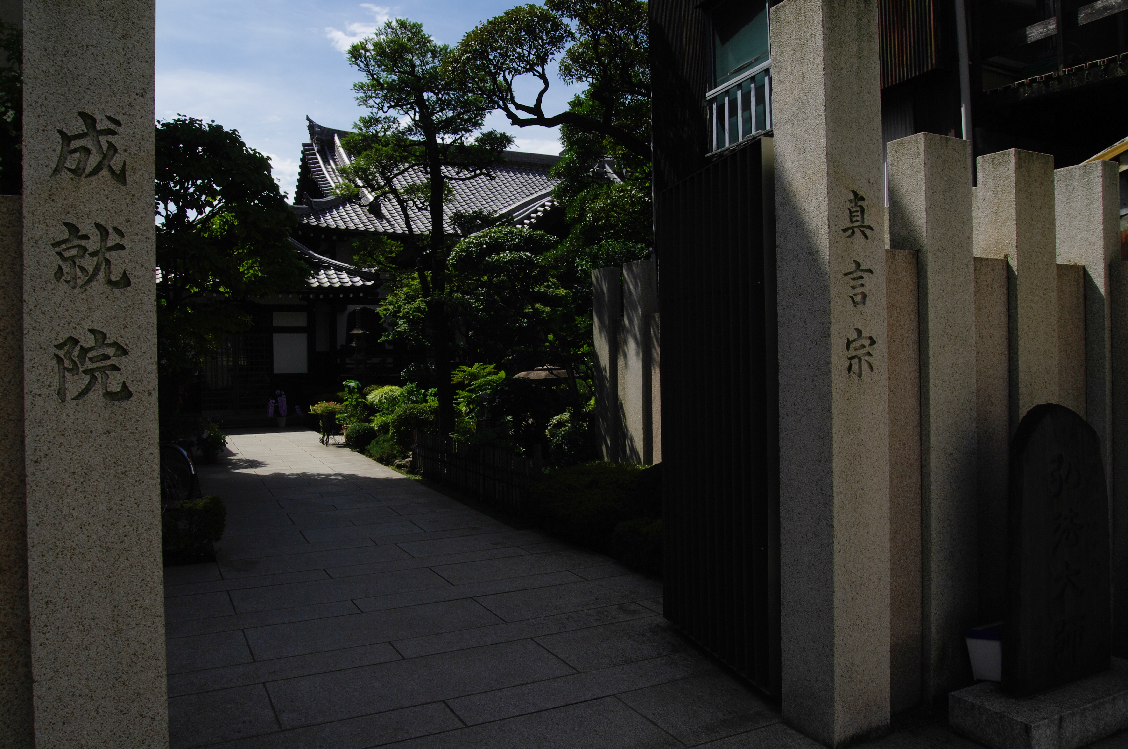 御府内八十八ヶ所 #78 成就院